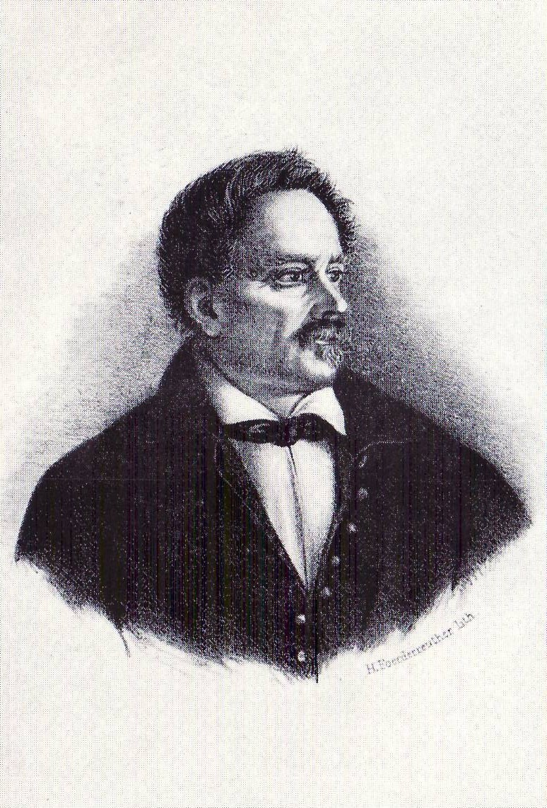 Lithographie, Brustbild Gottfried Eisenmanns